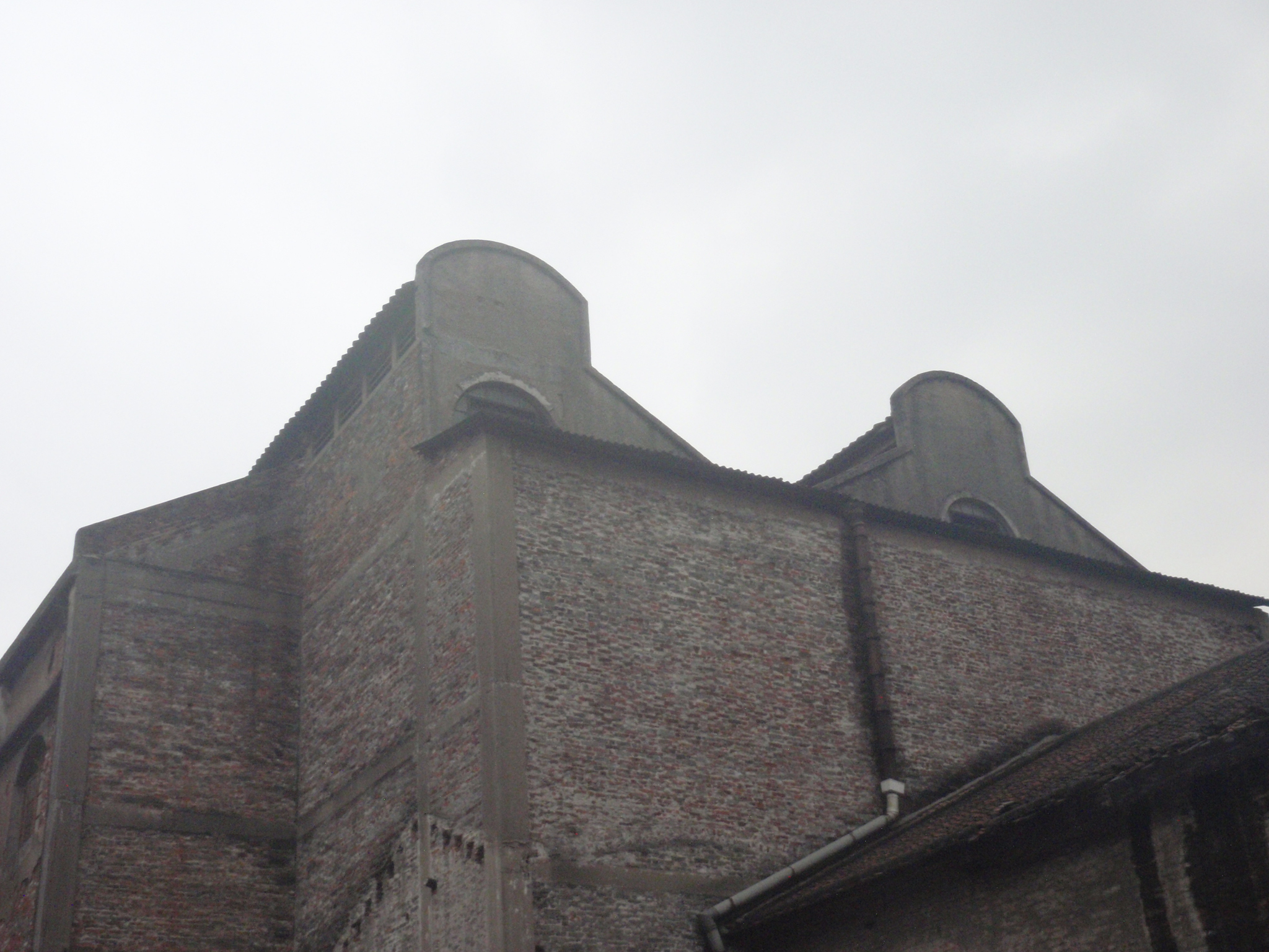 粵語: 廣州 河南 誠志倉